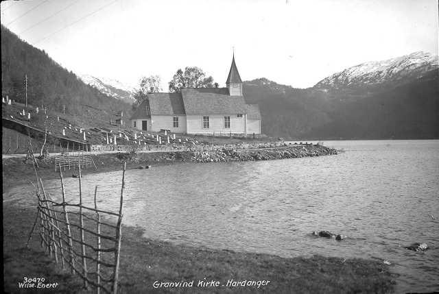 Granvin kyrkje